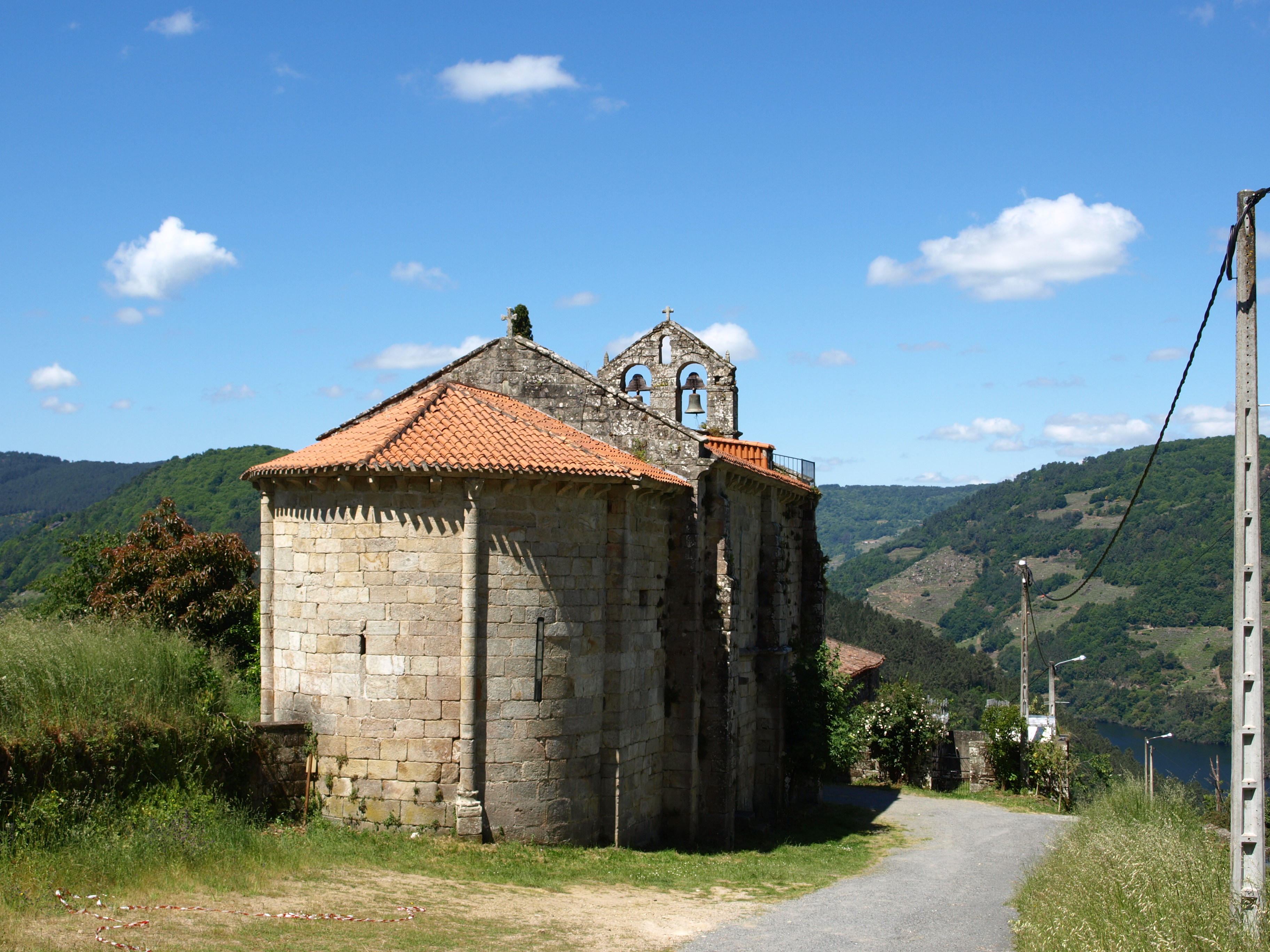 Igrexa parroquial de San Martiño da Cova (O Saviñao)